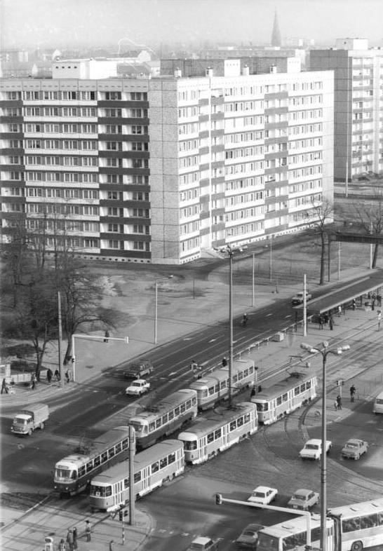 Dresden, Fucik-Platz, Wohnblocks, Straßenbahn ADN-ZB Häßler 5.3.82 Dresden: Schöne DDR. Der Fucik-Platz ist einer der Verkehrsknotenpunkt Dresdens. In seiner Nähe sind in jüngerer Zeit moderne Wohnhäuser entstanden. Nach dem Bombenangriff im Februar 1945 hatten auch hier alle Häuser in Schutt und Asche gelegen. Der Platz wurde nach dem tschechischen Widerstandskämpfer Julius Fucik, den die Faschisten 1943 hingerichtet haben, benannt.